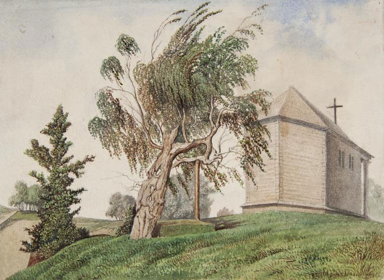 Беларуская (тарашкевіца): Туганавічы (Tuhanavičy), сядзіба Верашчакаў (Vieraščaka)